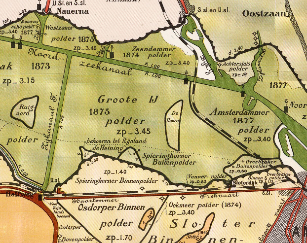 Grote IJ polder